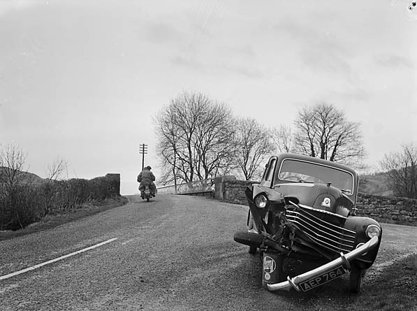 Teitl Cymraeg/Welsh title: Car Clement Davies ar ôl damwain ym Meifod. Ffotograffydd/Photographer: Geoff Charles (1909-2002) Dyddiad/Date: 04/04/1953 Cyfrwng/Medium: Negydd ffilm / Film negative Cyfeiriad/Reference: (gch04337) Rhif cofnod / Record no.: 3369082 Rhagor o wybodaeth am gasgliad Geoff Charles yn Llyfrgell Genedlaethol Cymru More information about the Geoff Charles Collection at the National Library of Wales Mae ffotograffau Geoff Charles hefyd yn rhan o Broject Europeana Libraries Geoff Charles' photographs also form part of the Europeana Libraries Project